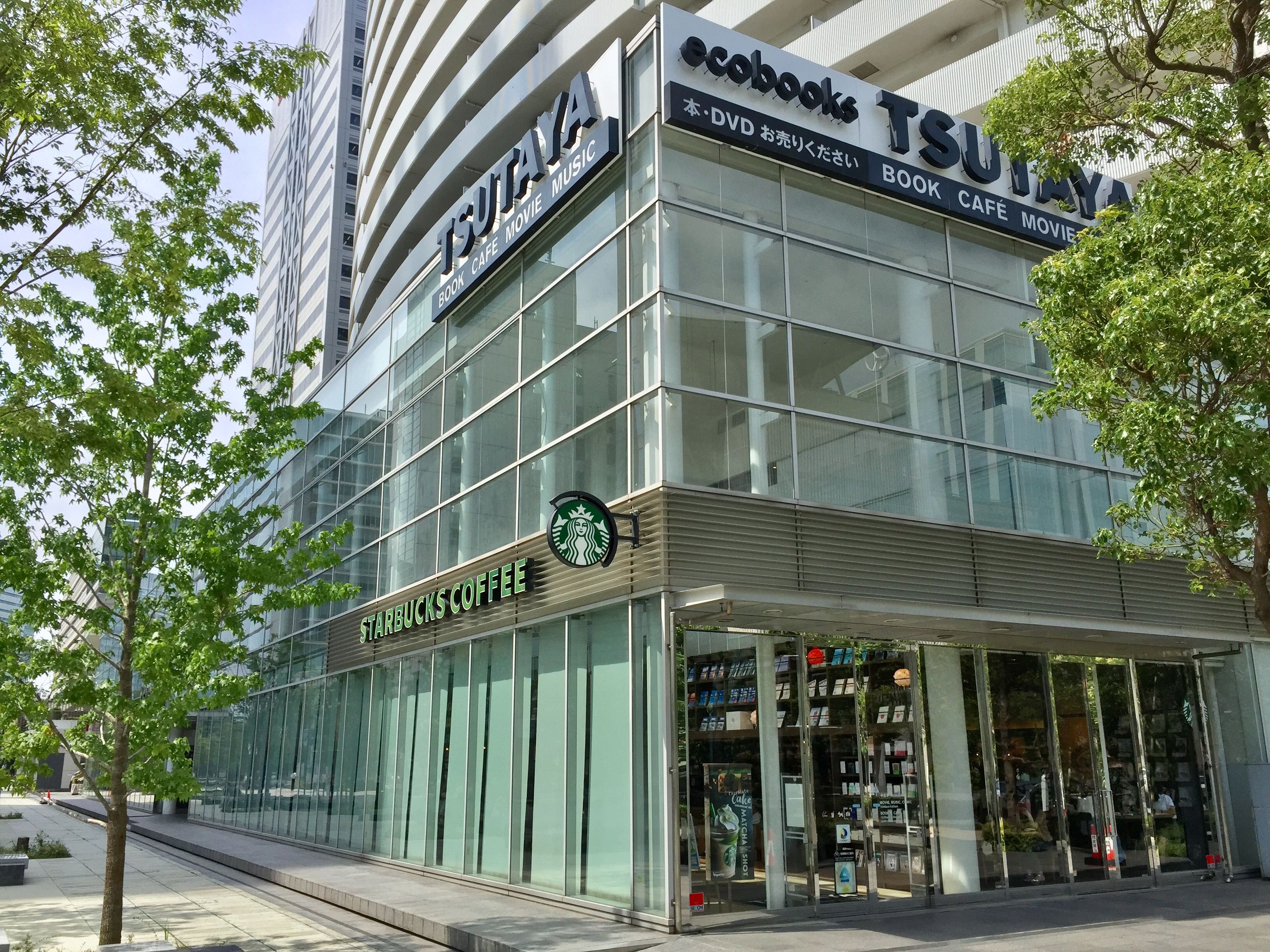 グランモール公園の「桟橋の広場」（横浜みなとみらい地区）。低層部にスターバックスとTSUTAYAが入る集合住宅「みなとみらいミッドスクエア」前。